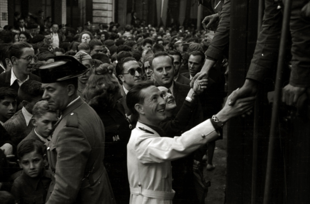 Título original: Llegada de integrantes de la División Azul a la estación del Norte (34/40) Localización: San Sebastián (Guipúzcoa)